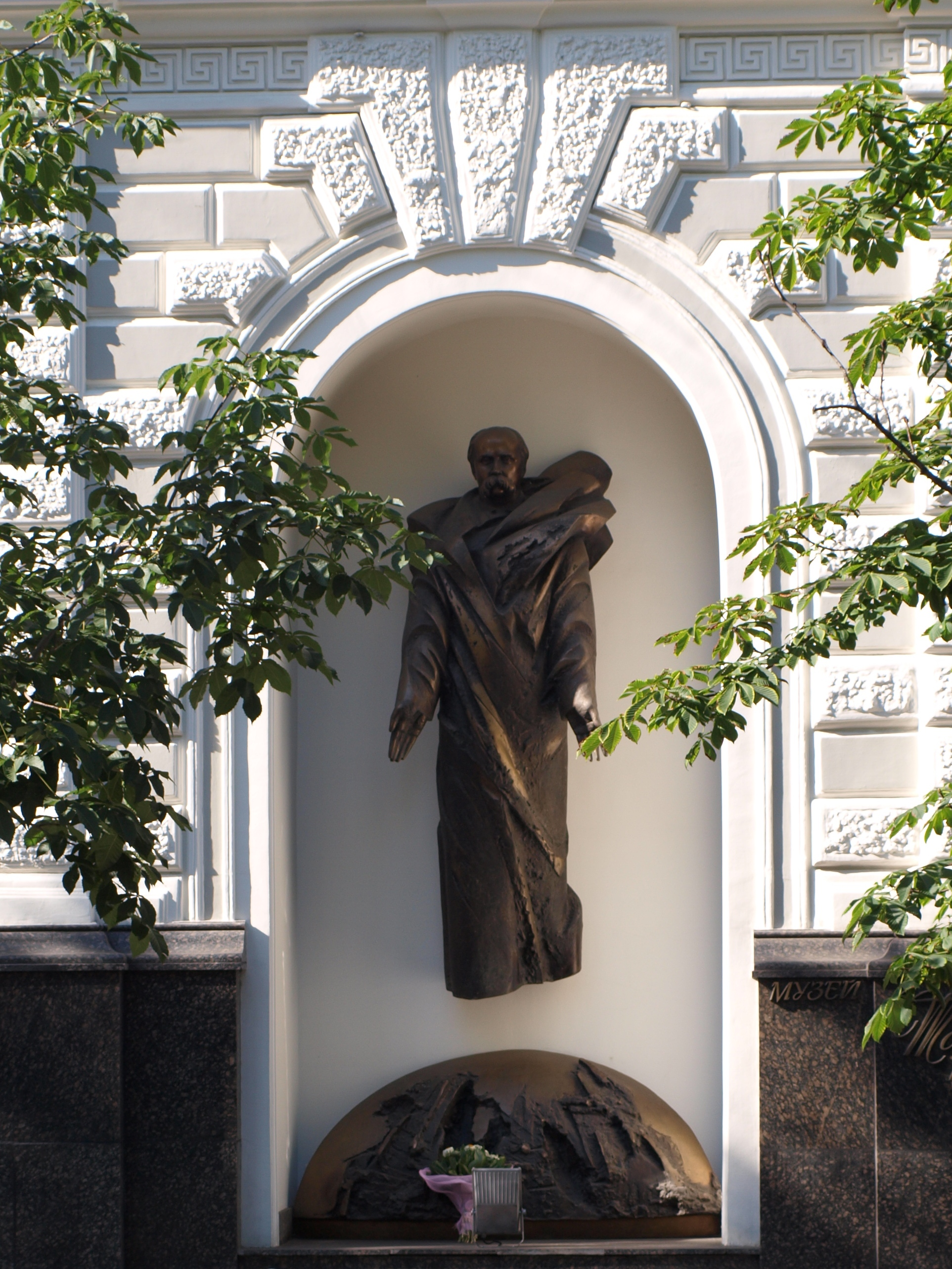 Особняк Демидова, кн. Сан-Донато (Державний музей Т. Г. Шевченка), Київ, Шевченка Тараса бульв., 12